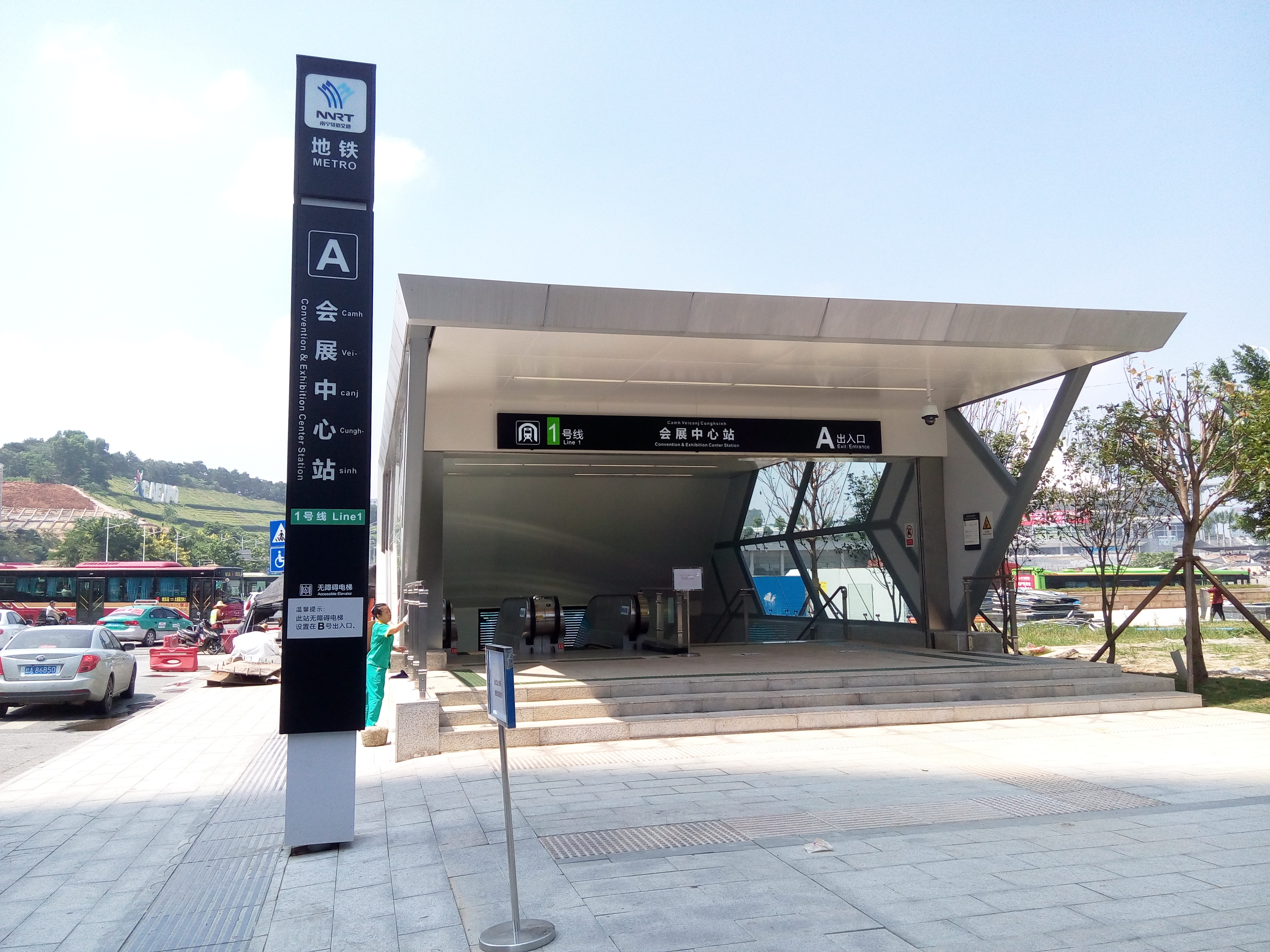 中文（中国大陆）: 南宁轨道交通